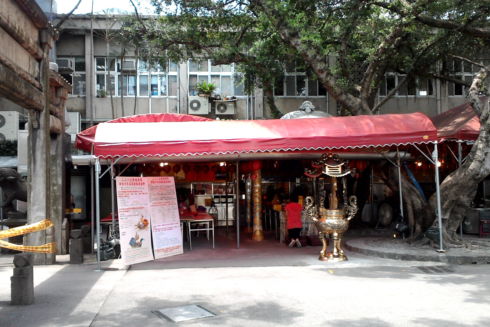 二二八公園福德宮全景,台北市中正區城內次分區黎明里